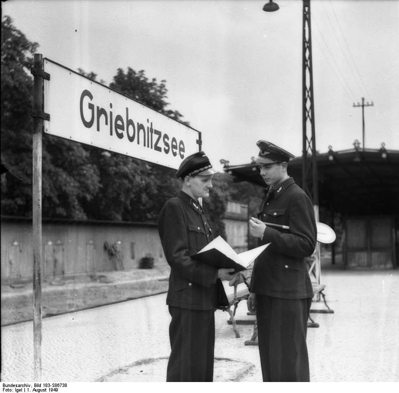 Bahnhof der Jugend Griebnitzsee eröffnet. Am 1.8.49 wurde der FDJ-Gruppe der Reichsbahn der Bahnhof Griebnitzsee übergeben. Alle Diensttuenden auf diesem Bahnhof sind Jugendliche. UBz: Dienststellenleiter Rudi Tietz (24 Jahre) im Gespräch mit dem Fahrdienstleiter Heinz Polle (20 Jahre) Aufn.: Illus/Igel 3665-49